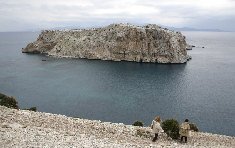 Vista del islote de Perejil desde la costa africana